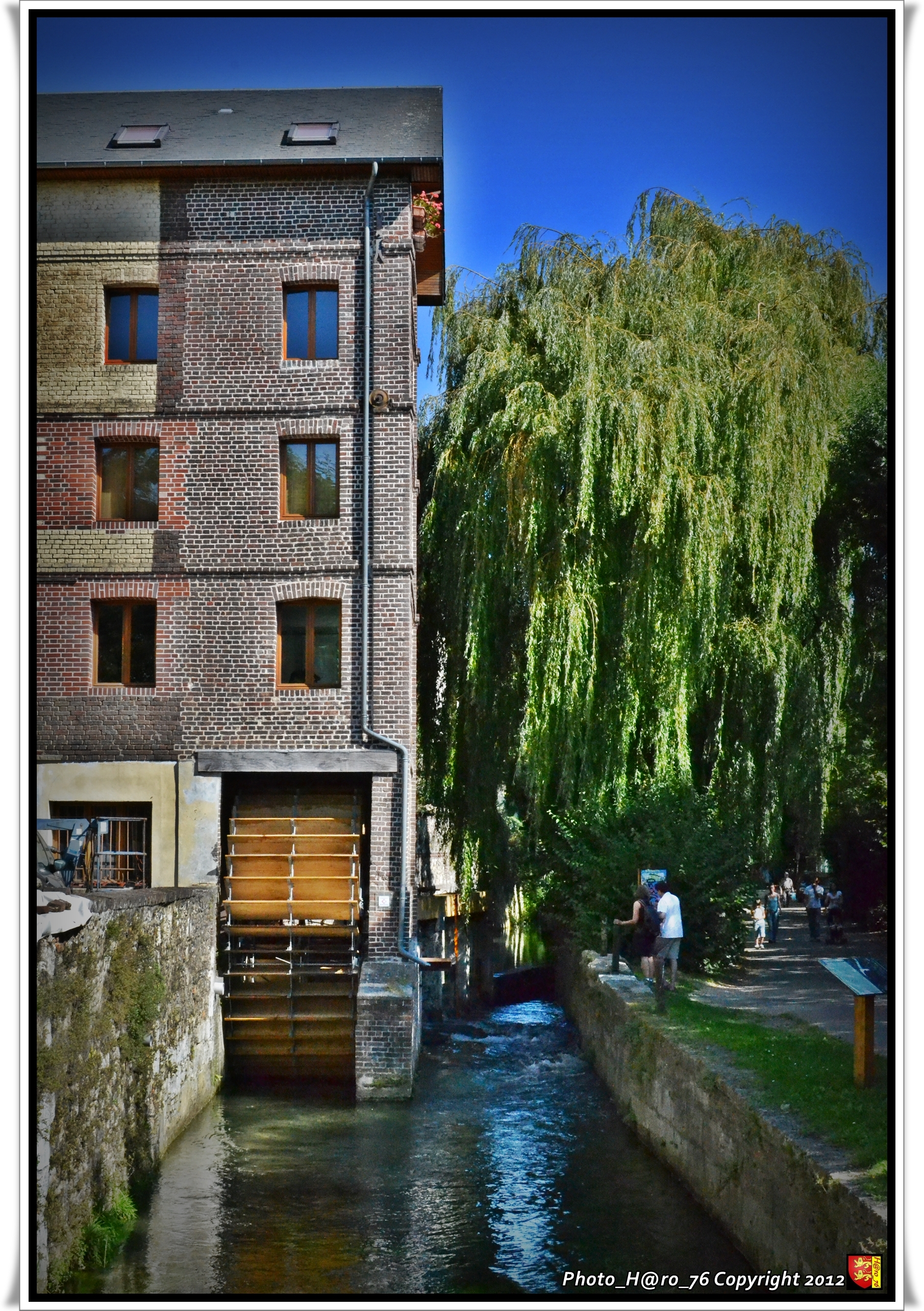 Depuis le 15 septembre 2012, le Moulin des Dames de St Amand s'est paré d'une nouvelle roue et d'un nouveau vannage sur le Robec